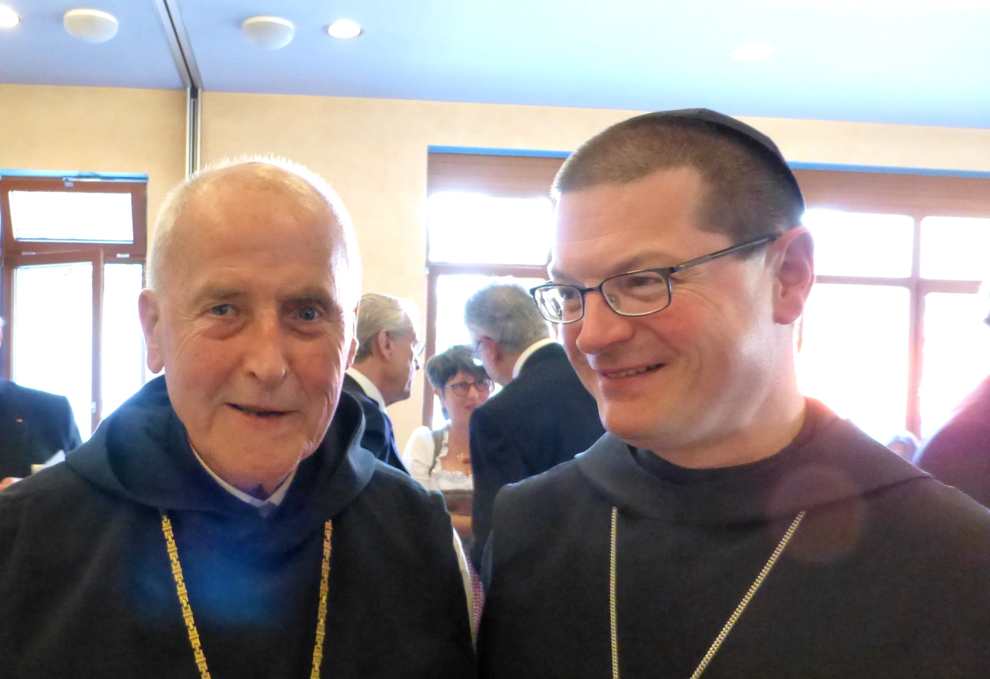 Erzabt Tutilo Burger OSB und Altabt Kassian Lauterer OCist bei der 50. Jahrfeier Komturei Ravensburg des Ritterordens vom Heiligen Grab zu Jerusalem in der ehem. Reichsabtei Ochsenhausen am 6. September 2014